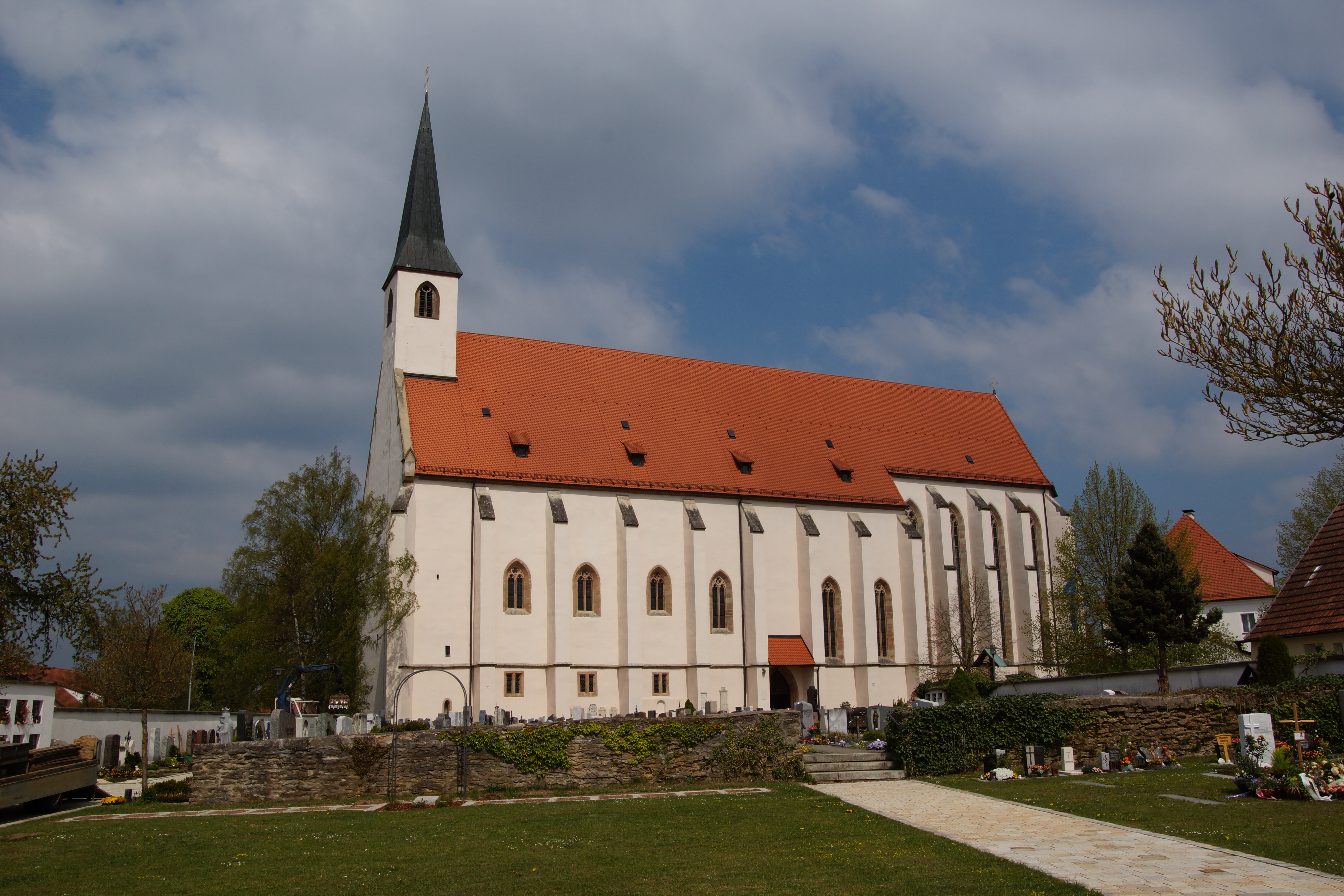 Kloster Seligenporten (Kreis Neumarkt in der Oberpfalz)